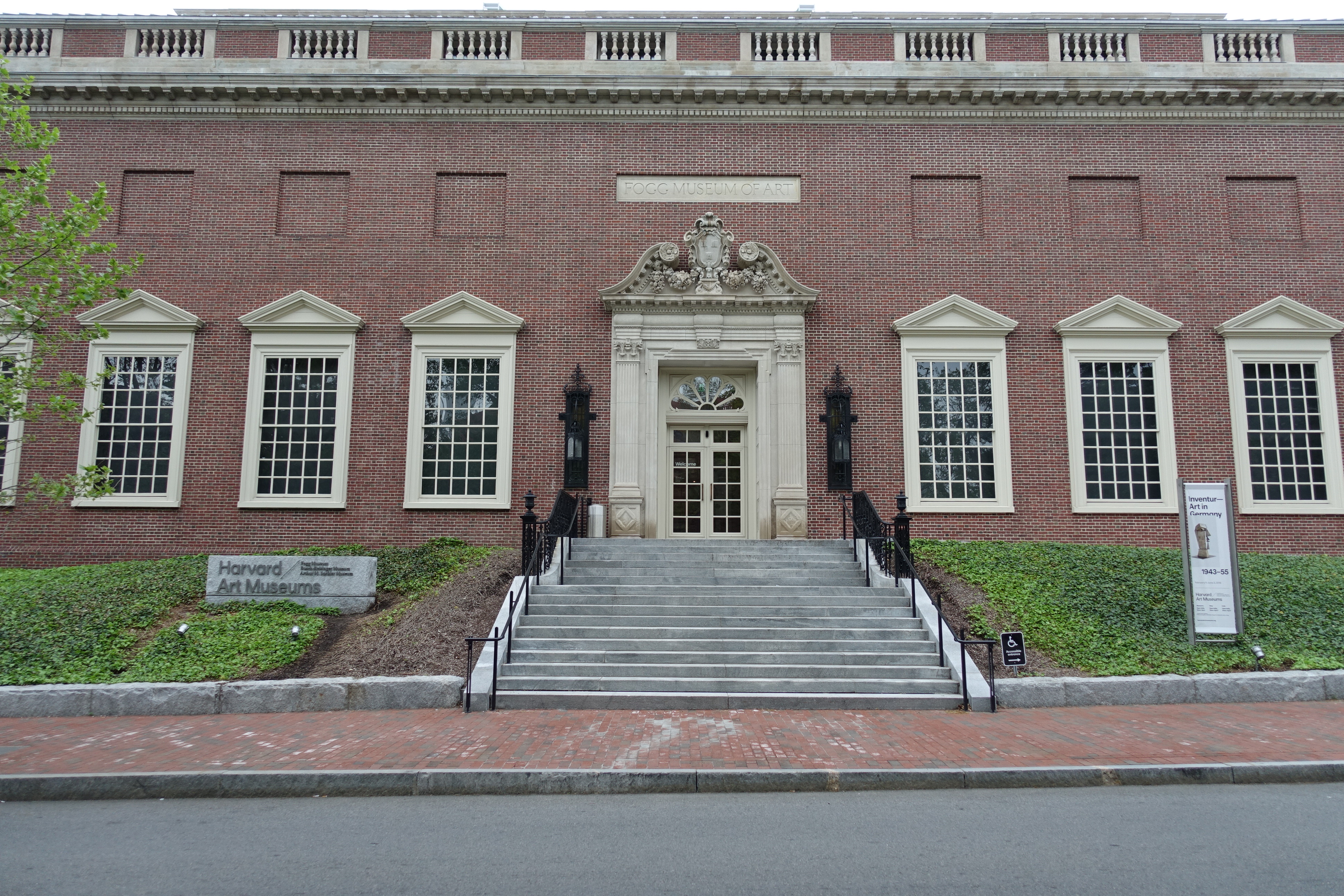 Der ehemalige Eingang zum Fogg Museum Of Art. Dieses ist Bestandteil der Harvard Arts Museums. Der Eingang zu allen drei Museen ist im Neubau von Renzo Piano.